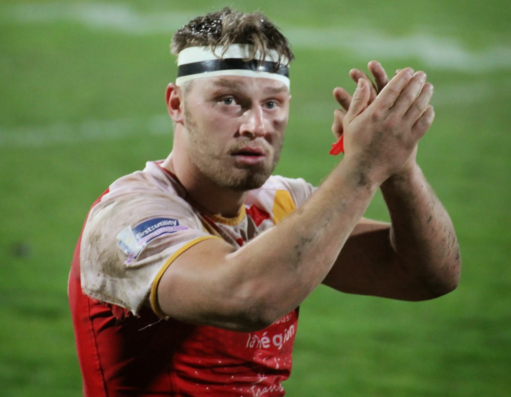 Elliott Whitehead, joueur Anglais de rugby à XIII.